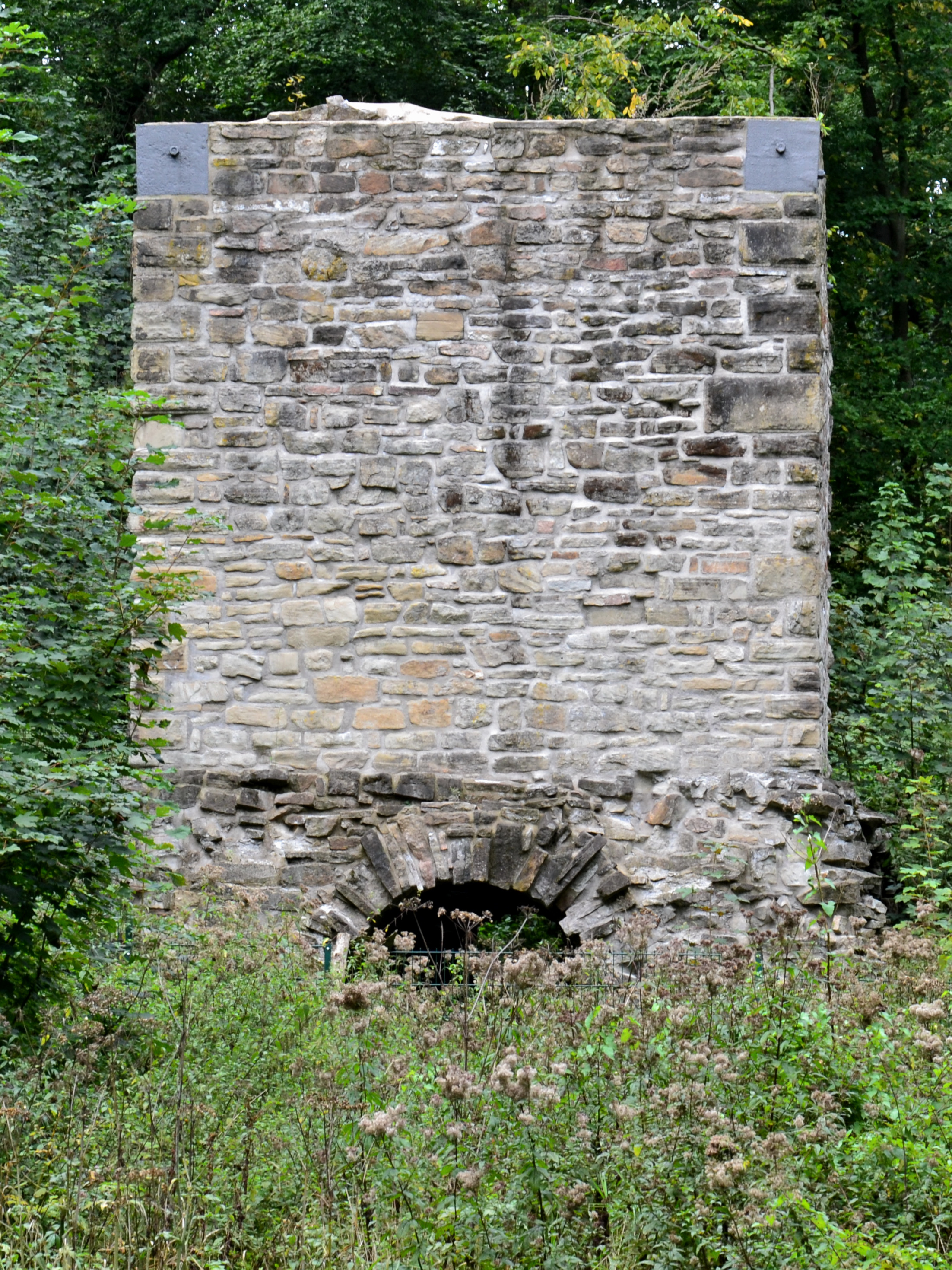 Sockel eines Bewetterungkamins der Zeche Viktoria in Essen-Byfang, Ende 19. Jahrhundert, unter Denkmalschutz. Hinter dem Rundbogen sorgte im Wetterofen ein offenes Feuer für den Luftzug aus dem Schacht, mit dem der Kamin über einen gewölbten Kanal auf der gegenüberliegenden Seite des Kamins verbunden war. Gesamthöhe des Kamins etwa sechs Meter.